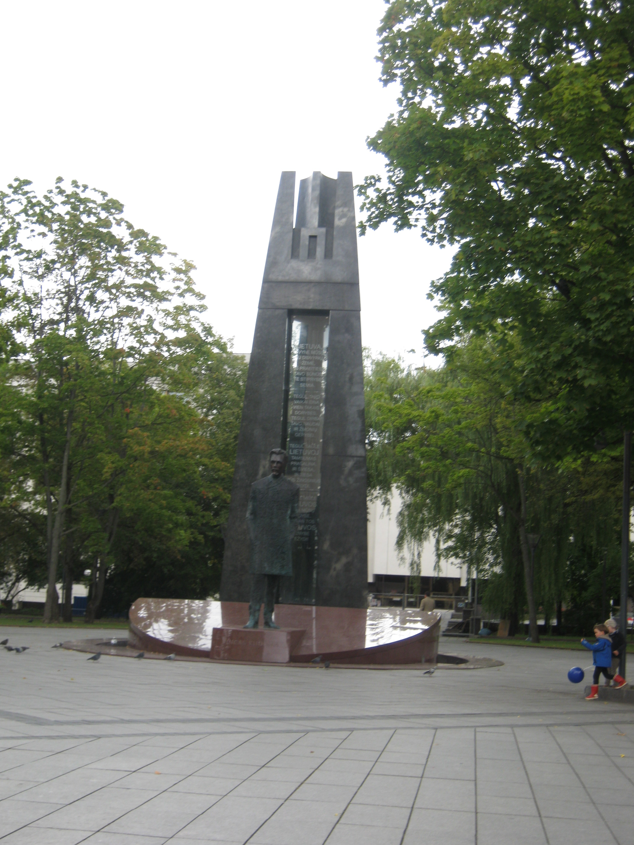 Paminklas himnui